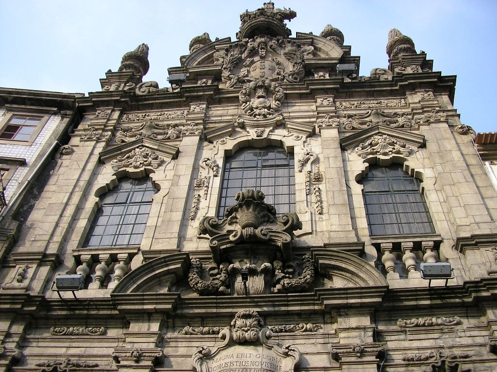 "Misericórdia" church in Porto, Portugal. Author: Manuel de Sousa.